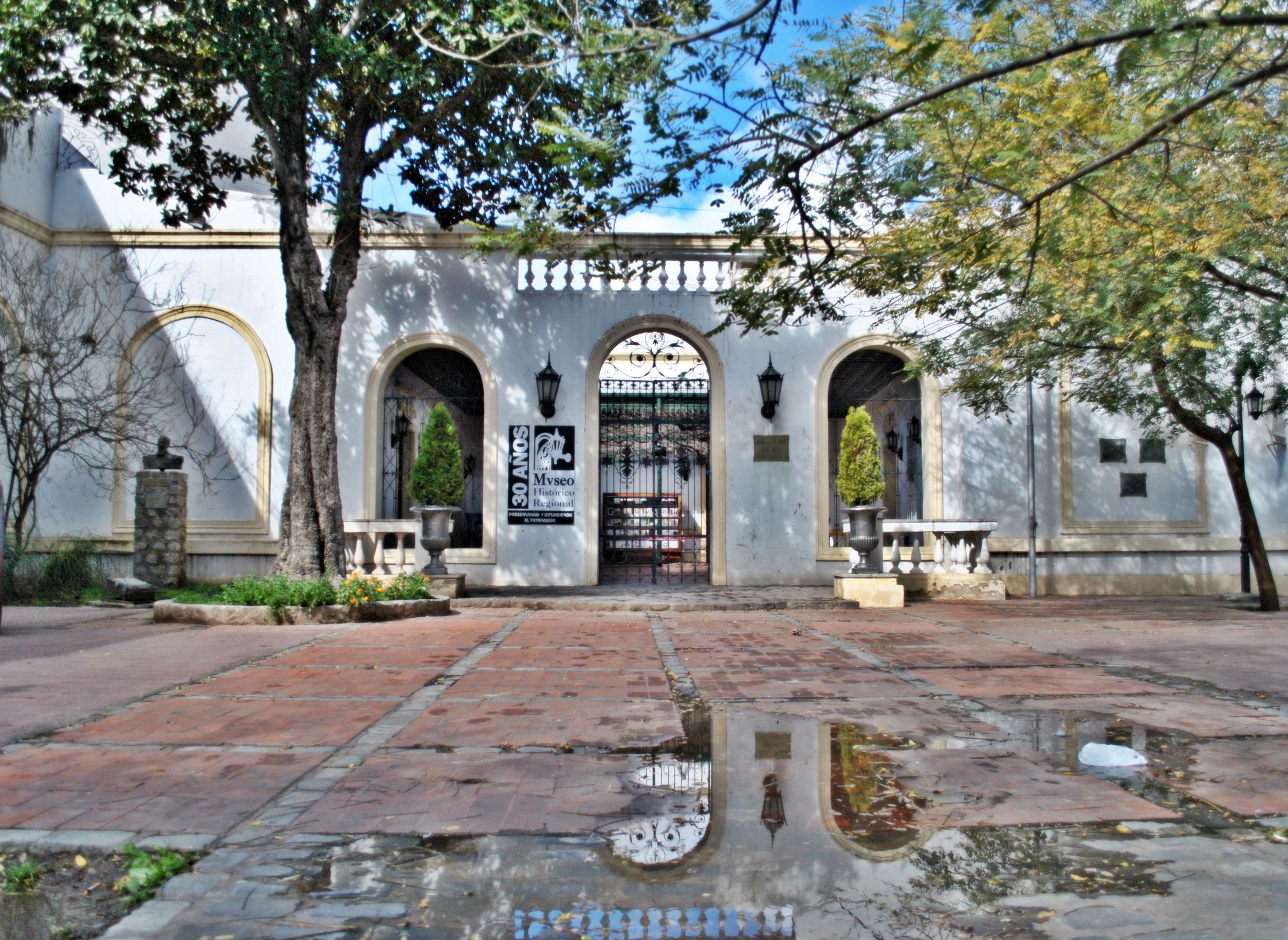 Fachada principal exterior del mencionado museo sito en la localidad de Río Cuarto provincia de Córdoba República Argentina.